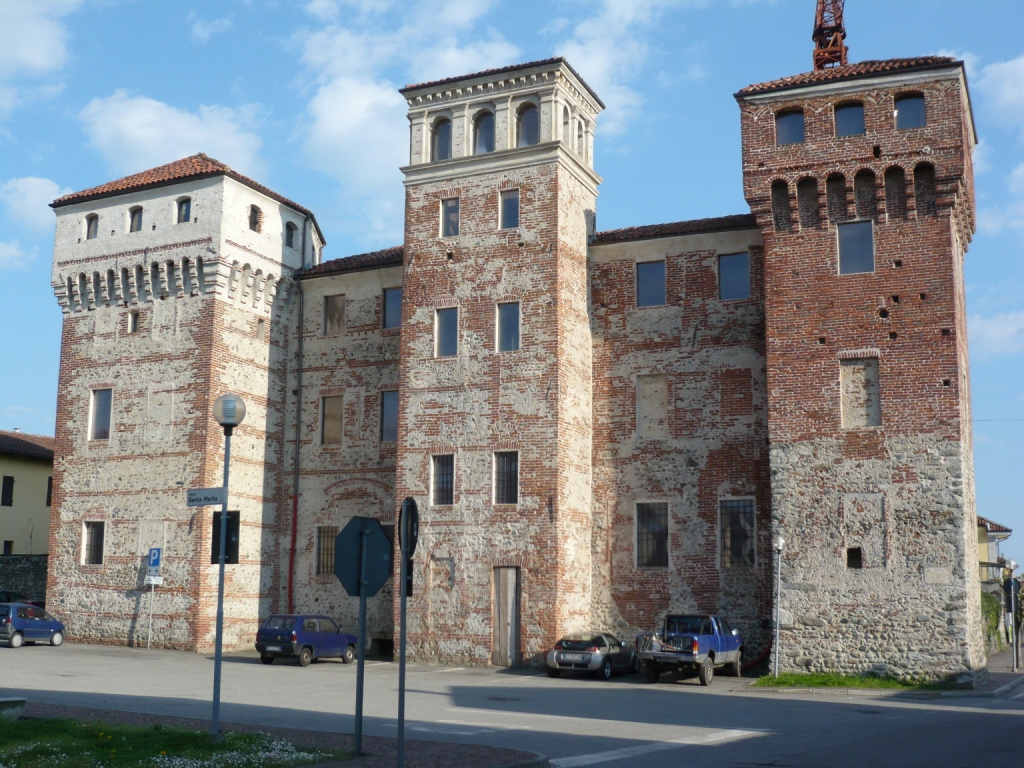 Castello di Ozegna; vista dal lato nord, con le tre torri